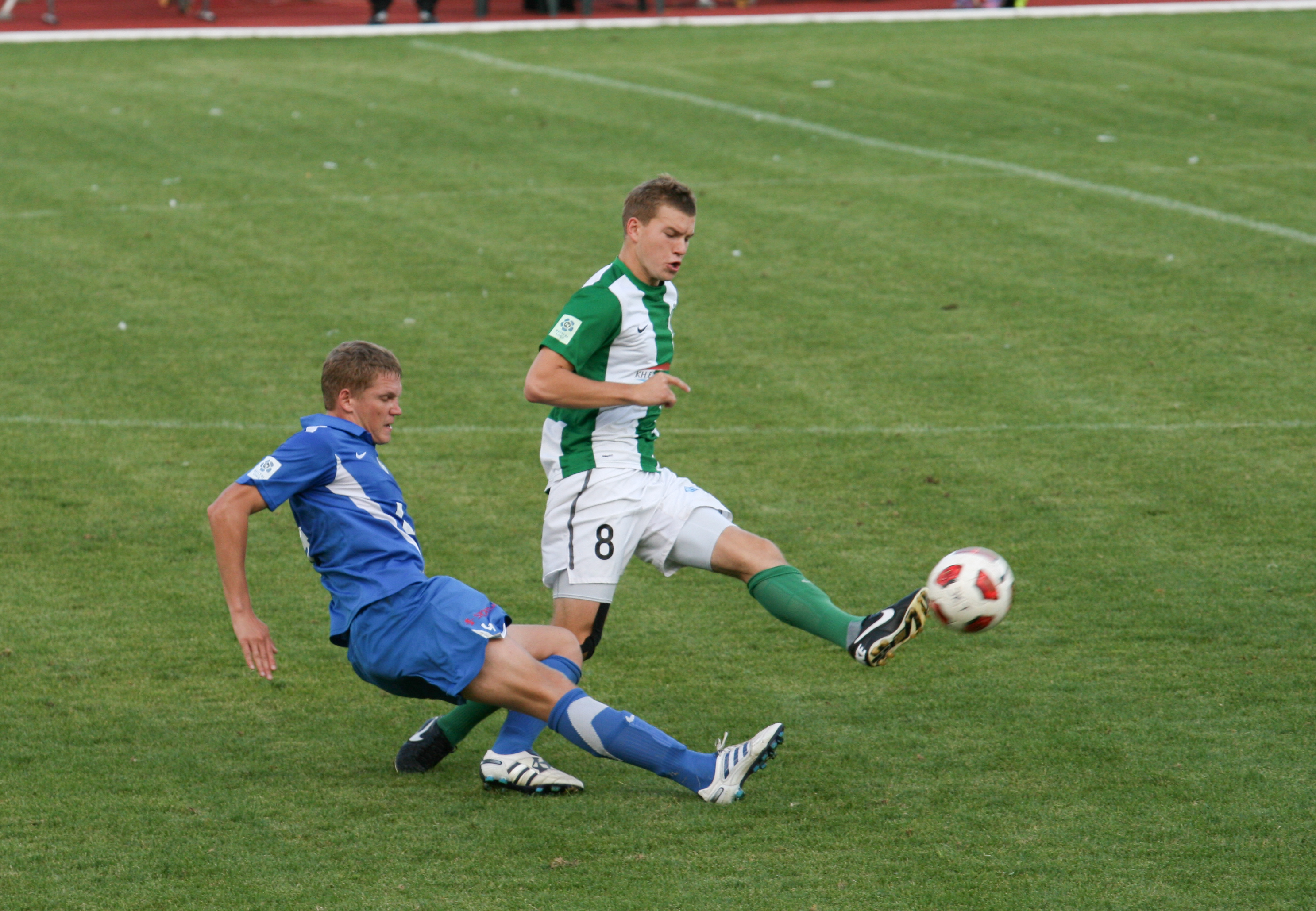 FC Flora